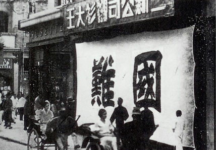 上海某服装商店在九一八事变发生后懸掛「國難」兩個大字。